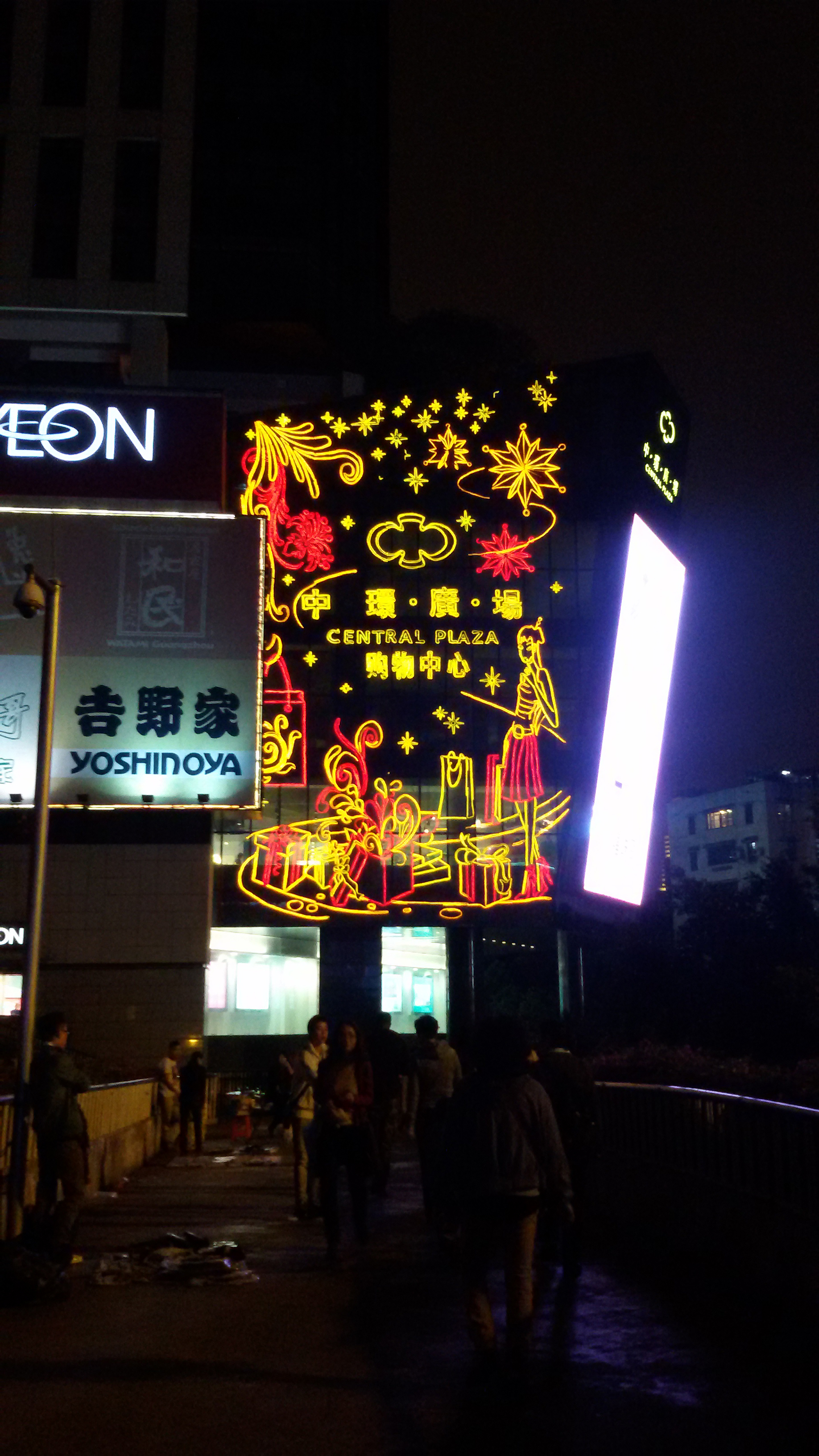 粵語: 广州嘅中环广场